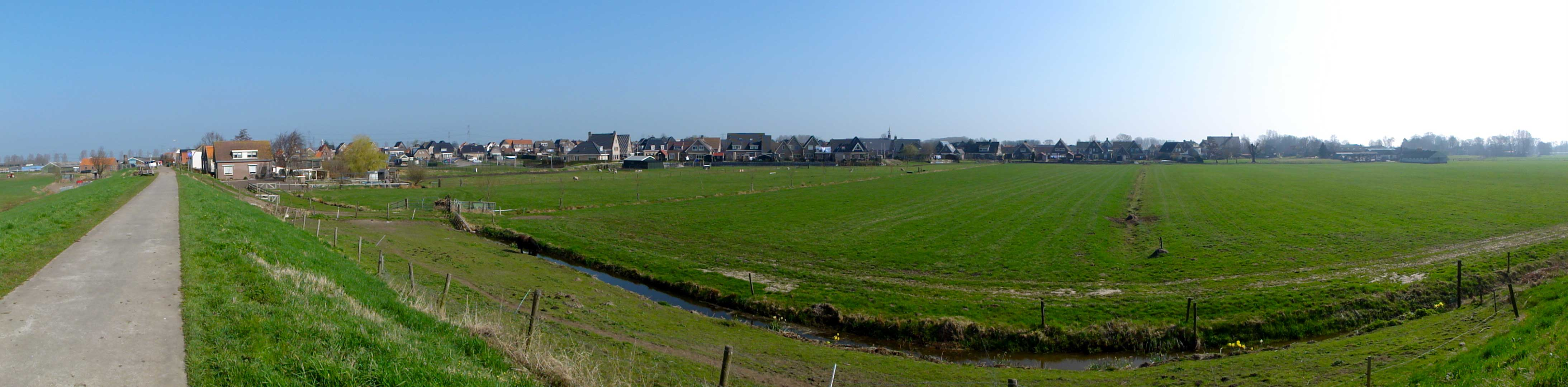 Zicht op Grafhorst in Overijssel